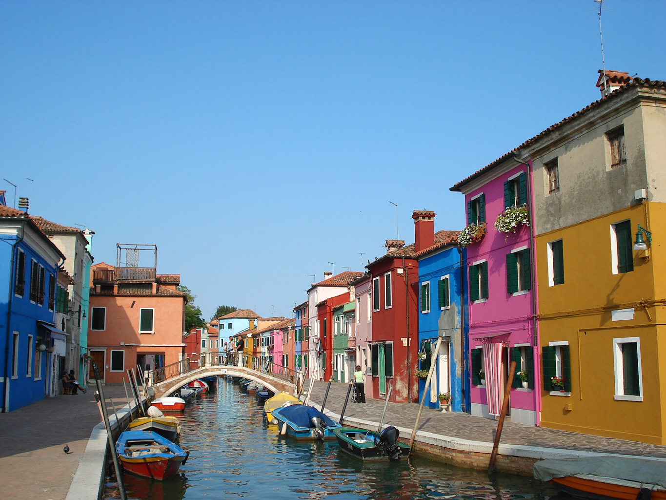 Dëst Bild weist déi faarweg Fëscherhaiser vu Burano (an der Lagun vu Venedeg))